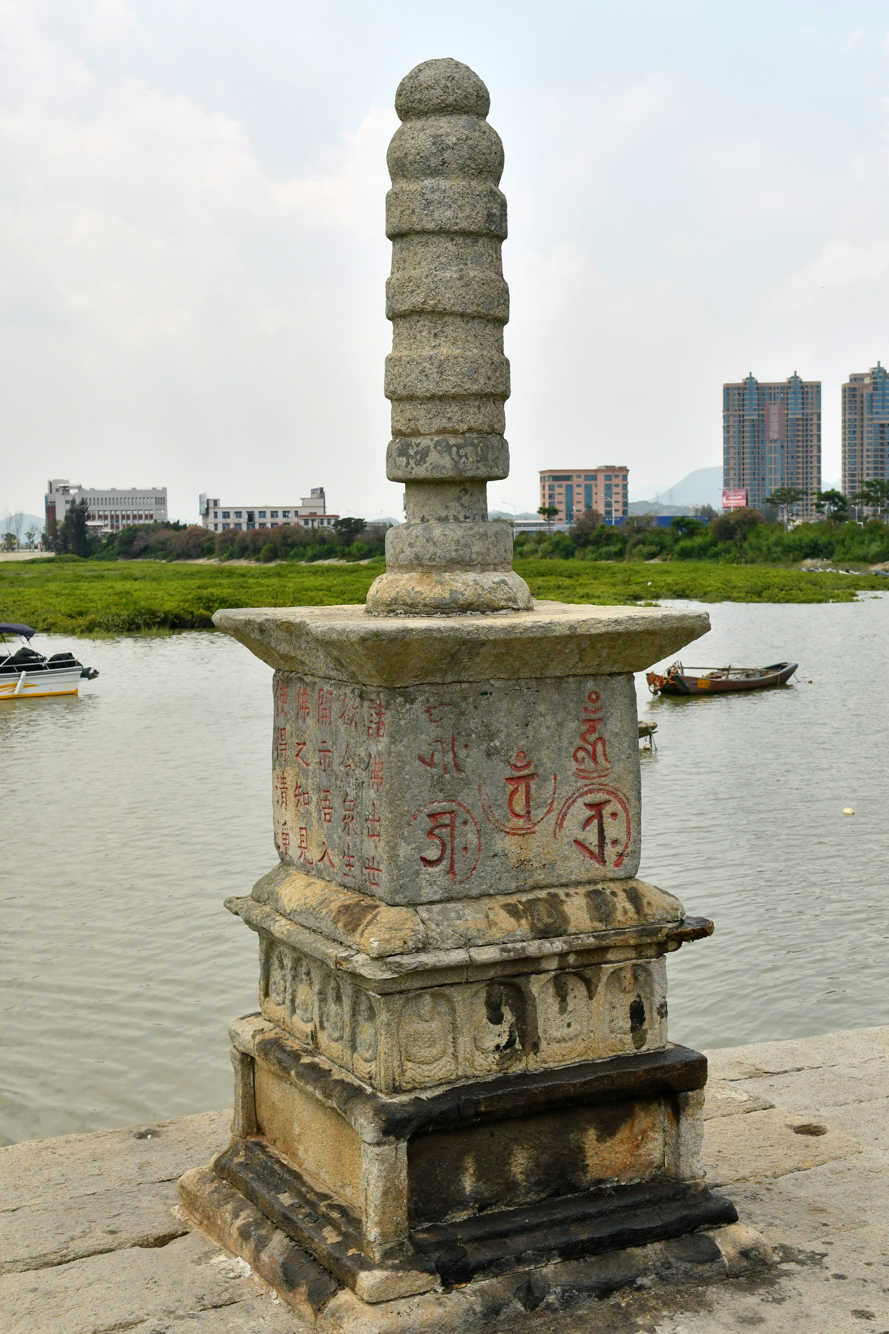 泉州洛阳桥，桥身中部的“月光菩萨塔”（宝箧印经式塔），塔身东面刻有梵文；南面刻有佛教揭语“諸佛出世，欲令眾生，開示悟人，佛之知見，使得清淨。”